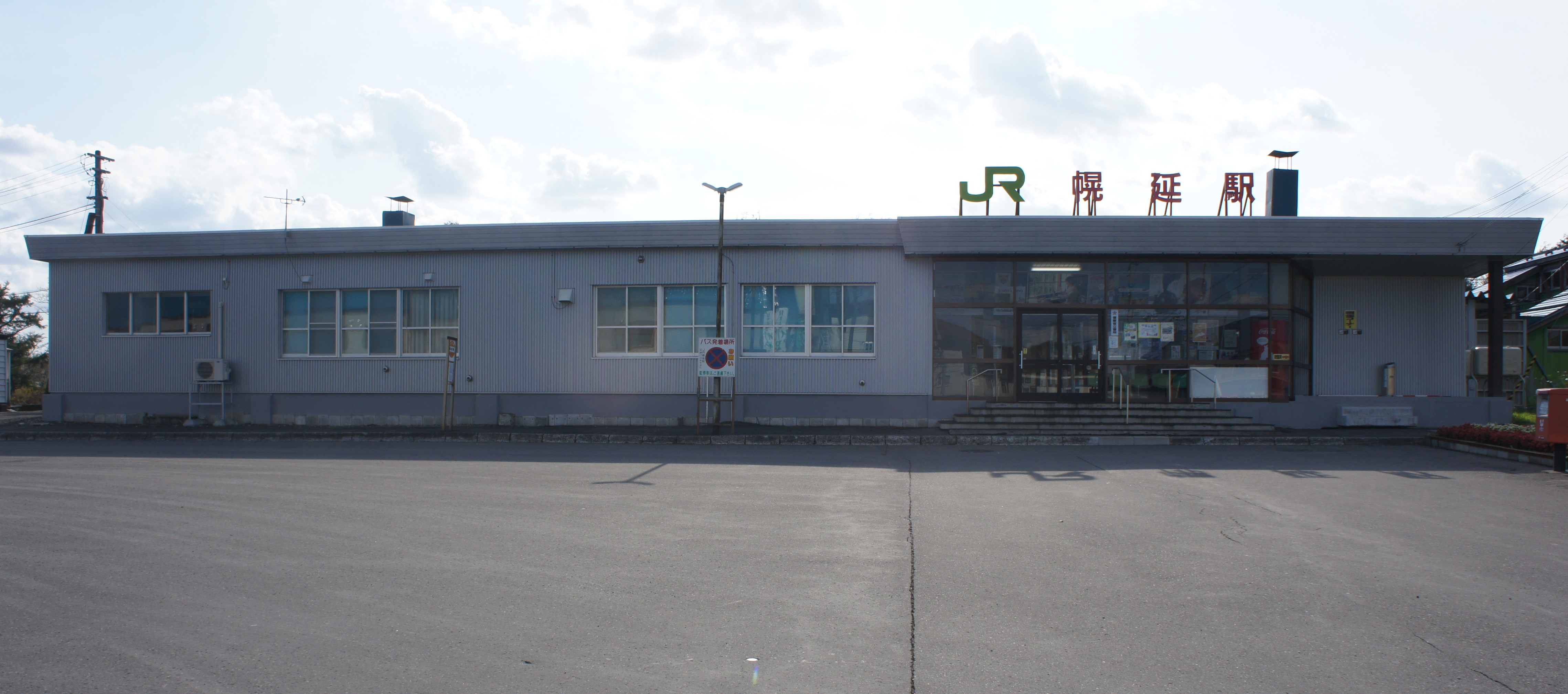 JR宗谷本線・幌延駅の駅舎 Sony NEX-3